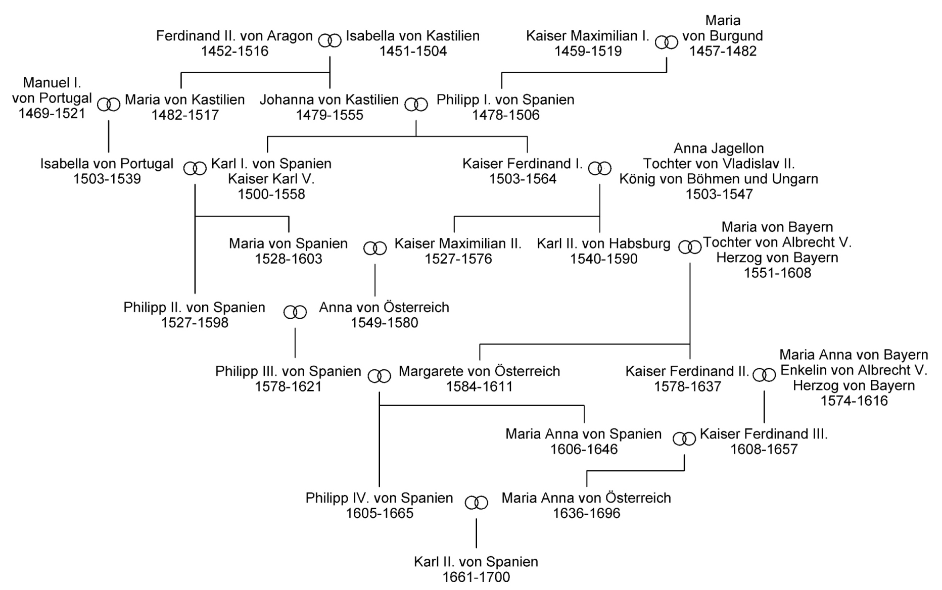 Die Vorfahren des spanischen Königs Karl II. Autor: Chris Furkert